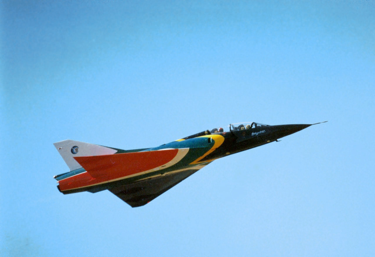 SAAF Mirage III BZ 817